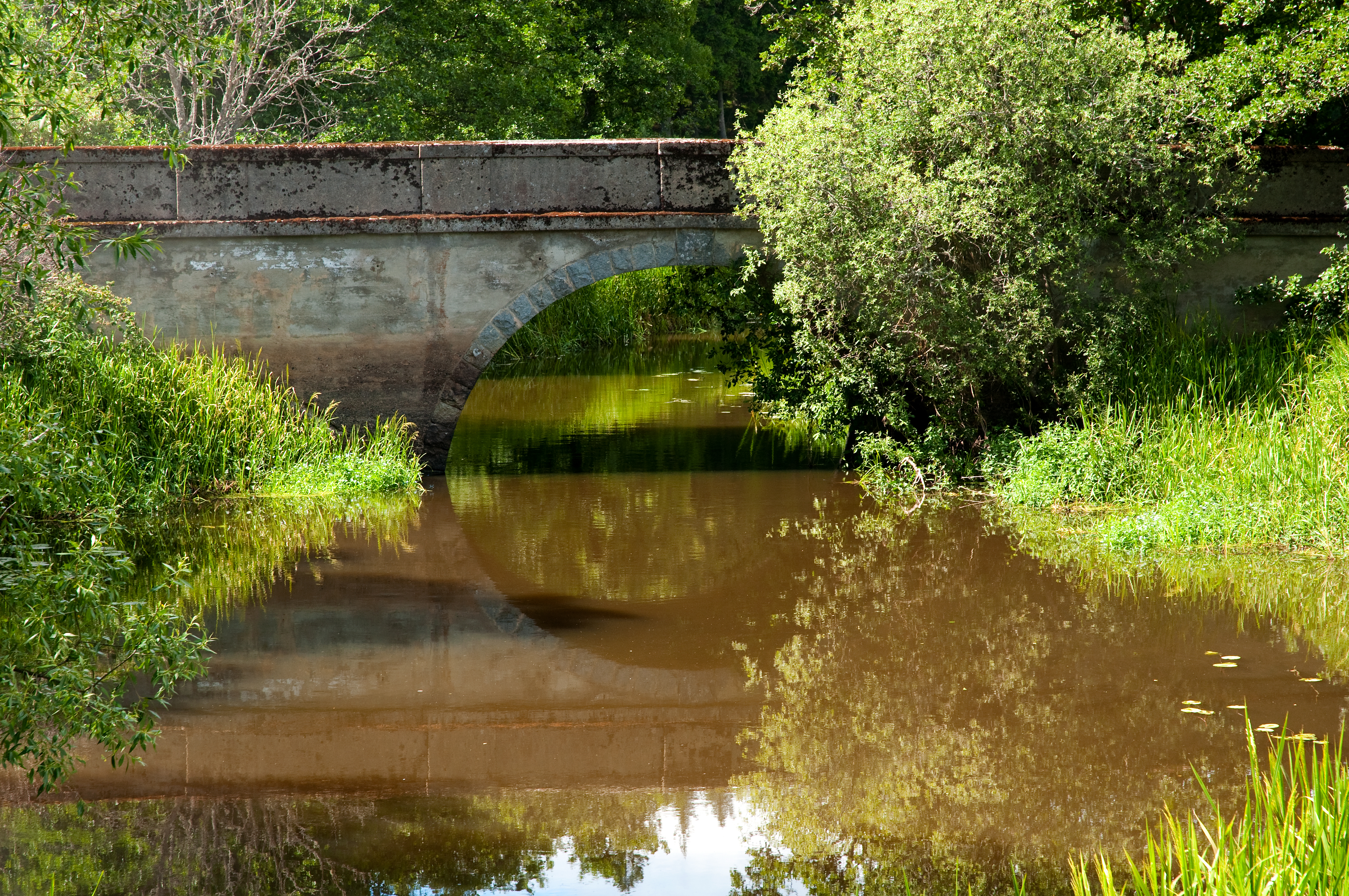 Gamla bron över Svärtaån vid Svärta